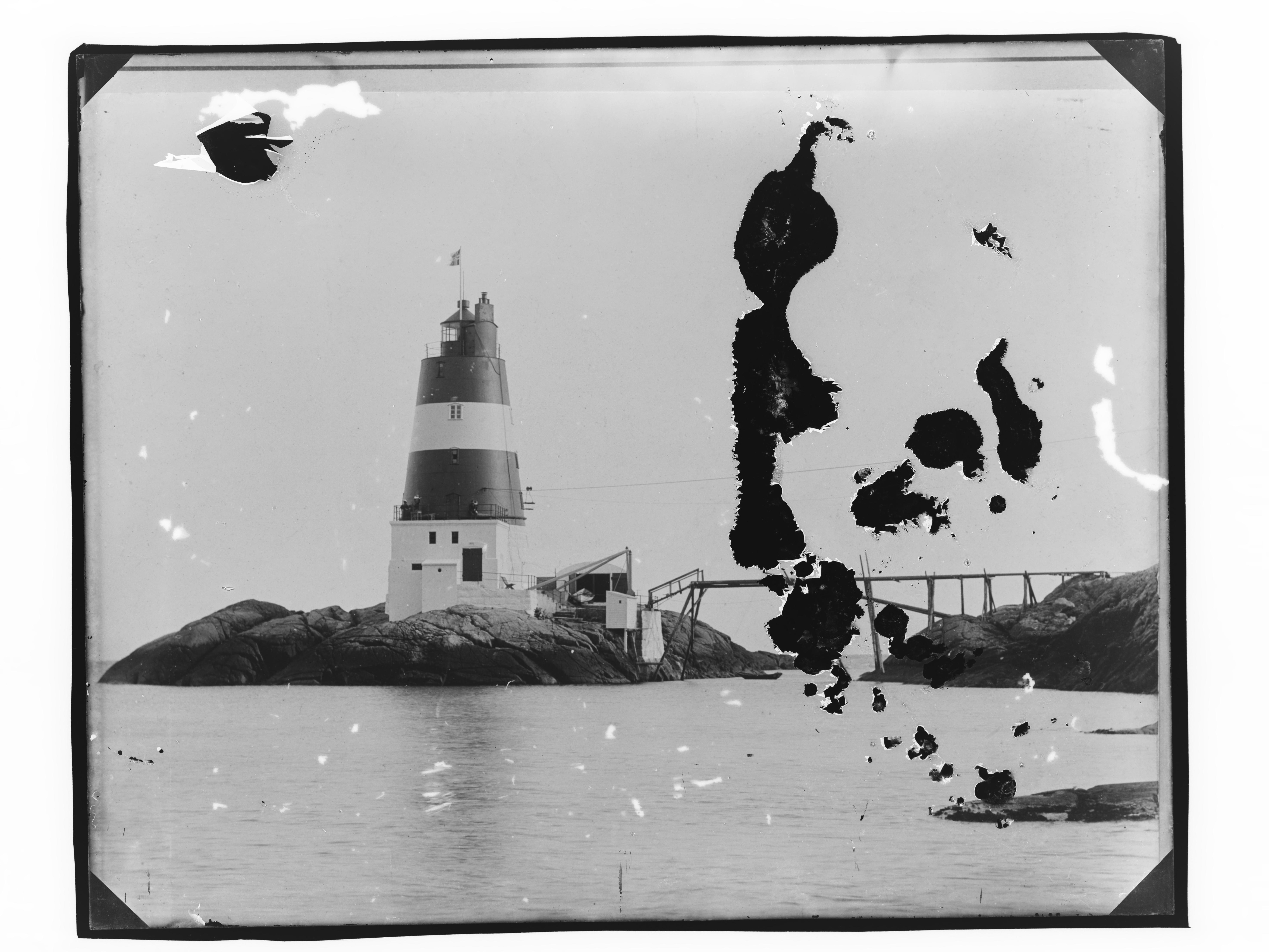 Påskrift konvolutt: B-220 Sokndal. Lille Presteskjær fyr [Riksantikvaren] Sted: Lille Prestskjær Kommune: Sokndal Fylke: Rogaland Tagger: repro: Lille Presteskj fyr fyrstasjon svaberg